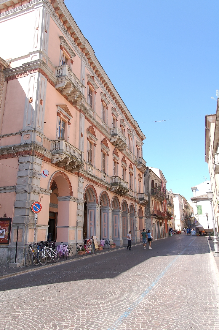 Atri 2011